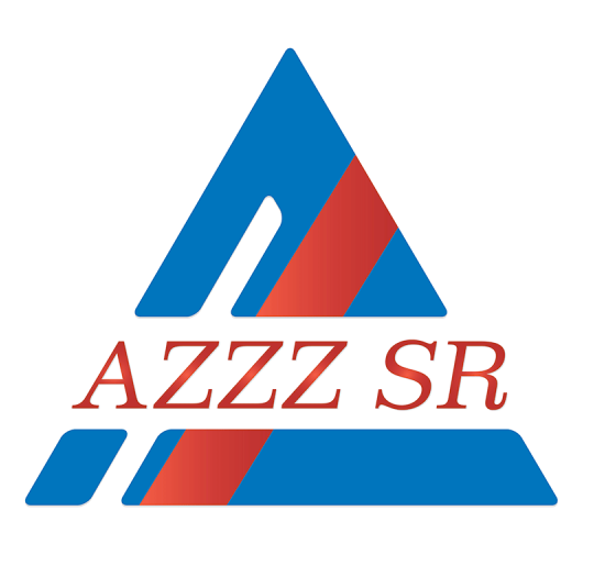 Logo AZZZ